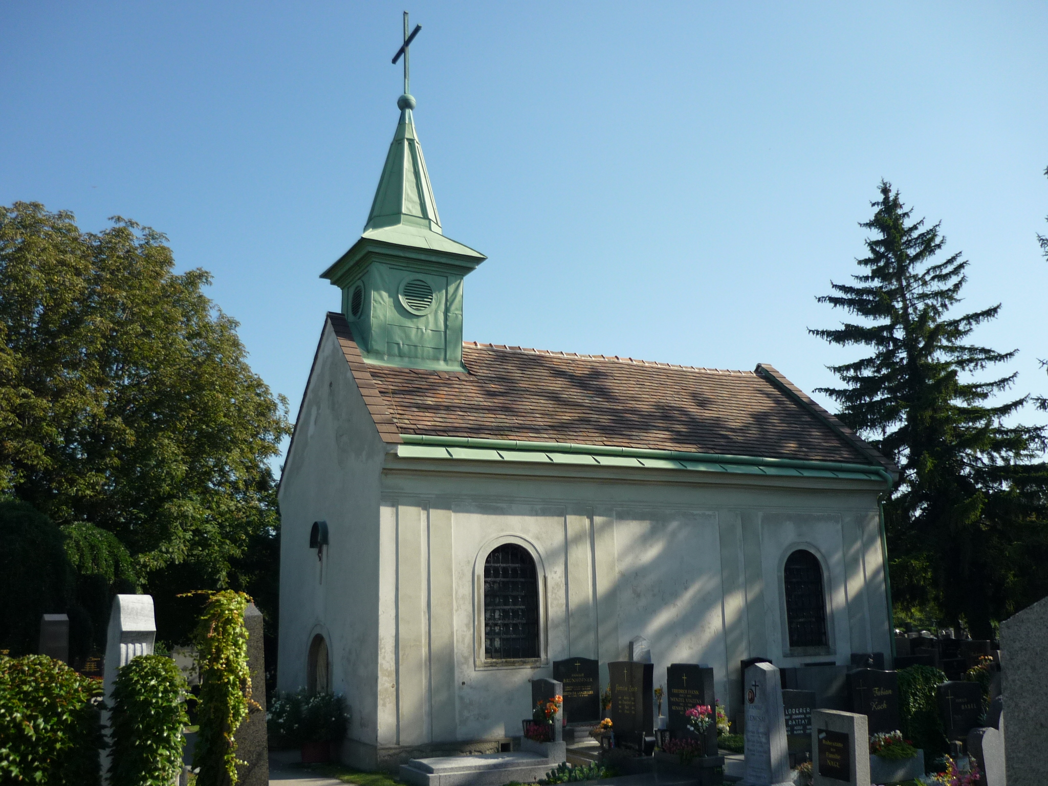 Kapelle in Schwechat, Österreich, die im Zentrum des ehemaligen Kastells Ala Nova steht, an der Stelle wo die Principia sich befand.